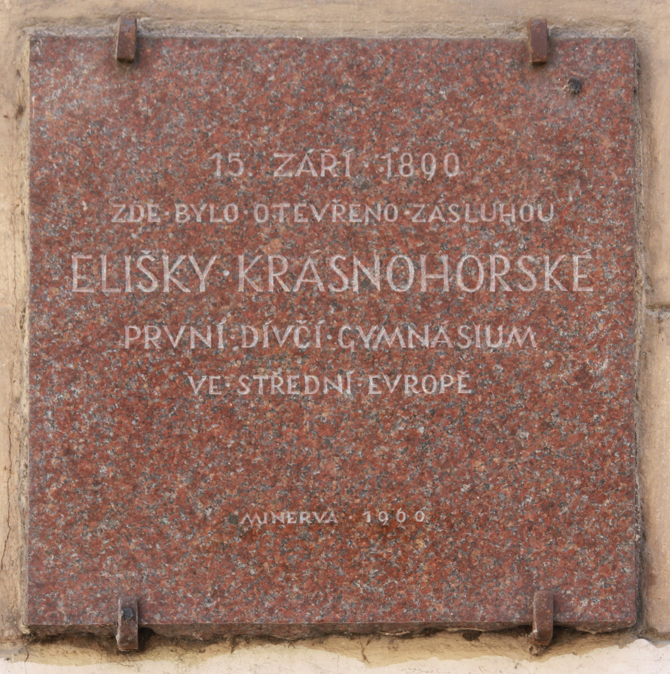 Pamětní deska v Pštrossově ulici 15/202 - Eliška Krásnohorská, první dívčí gymnázium ve střední Evropě